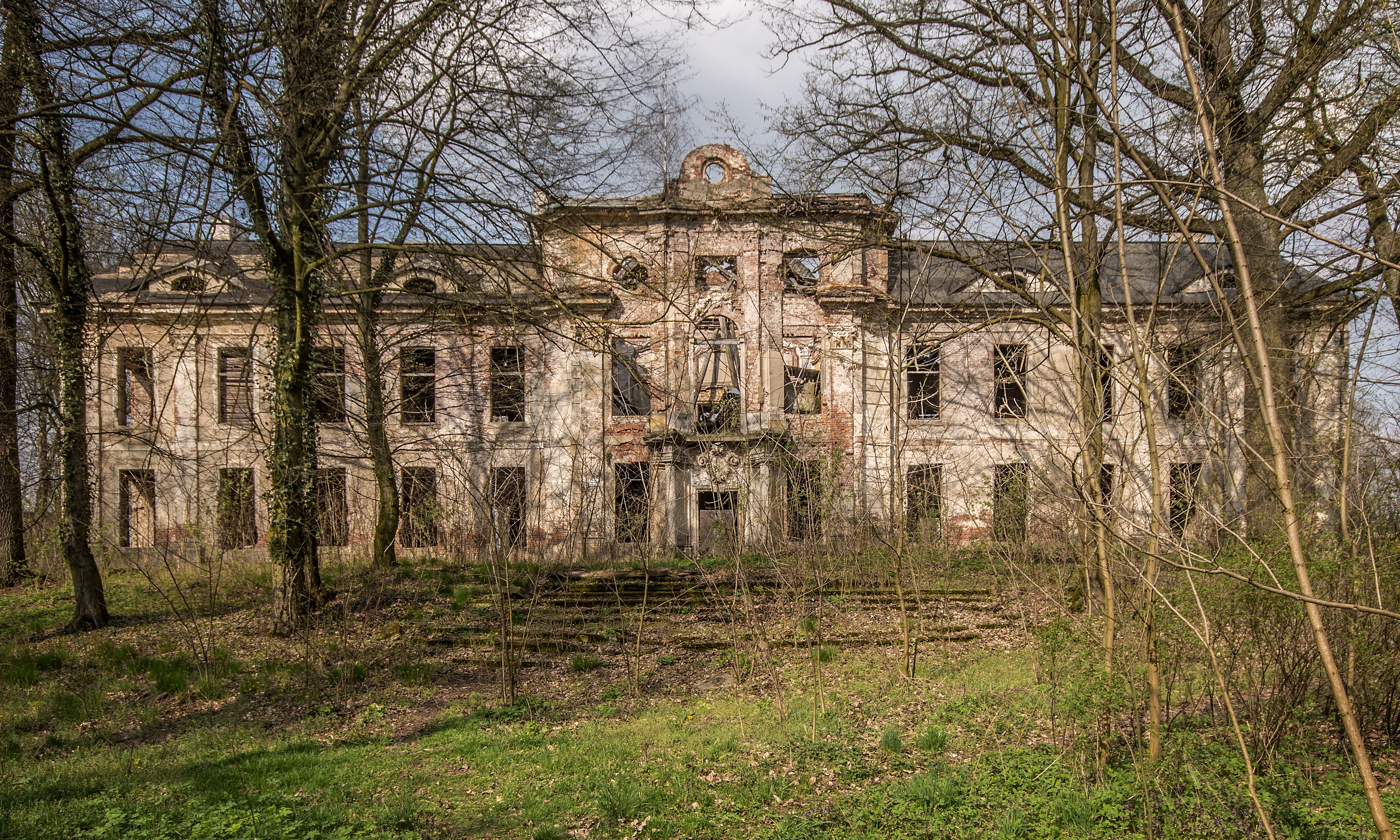 Brzezinka, pałac, 1725, XIX